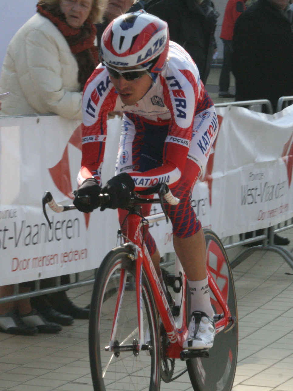 Driedaagse van West-Vlaanderen 2011, proloog in Middelkerke